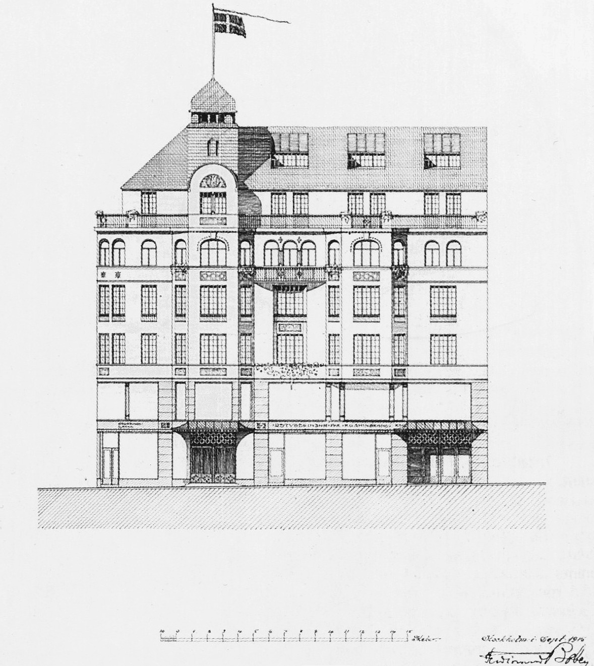 NK:s kontorshus, Regeringsgatan 5-7 (invigd 1919), Bobergs fasadritning mot Regeringsgatan